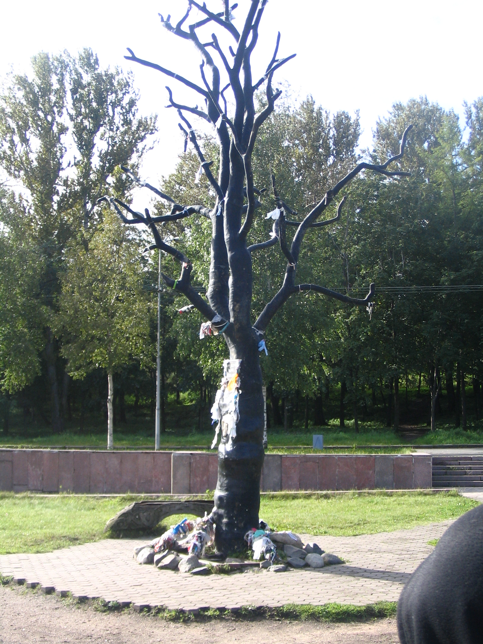 Дерево желаний в Петрозаводске